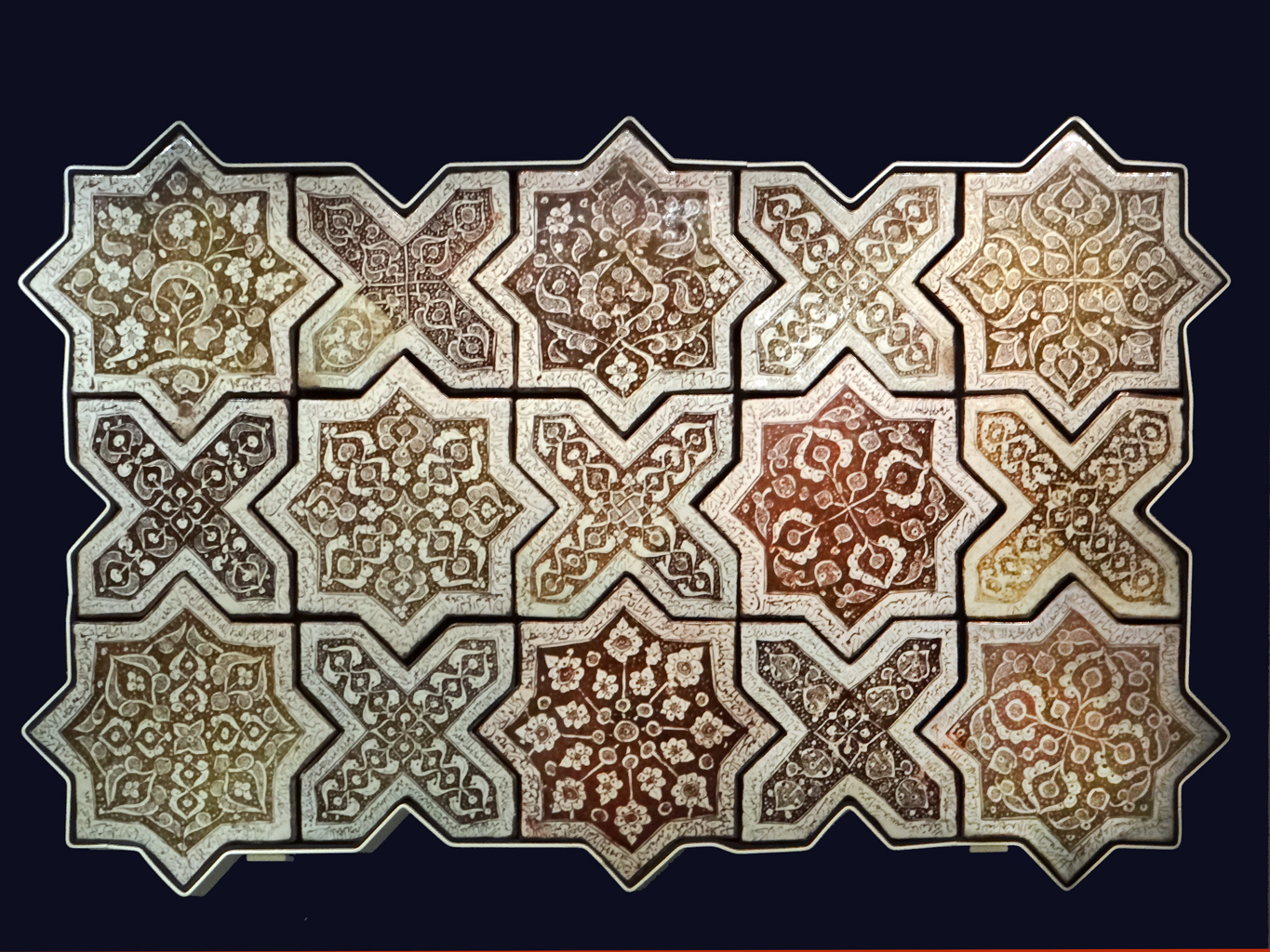 Carreaux de céramique avec décor de lustre métallique Lustre Tiles Iran probablement Kashan 1262 Le décor de ces carreaux de céramique avec un lustre métallique fait partie des innovations mises au point en Irak au IXè siècle. Ces carreaux proviennent de la tombe d'un descendant du Prophète Mahomet à Varamin près de Téhéran. Tous les carreaux sont différents, ils étaient entourés de citations du Coran.